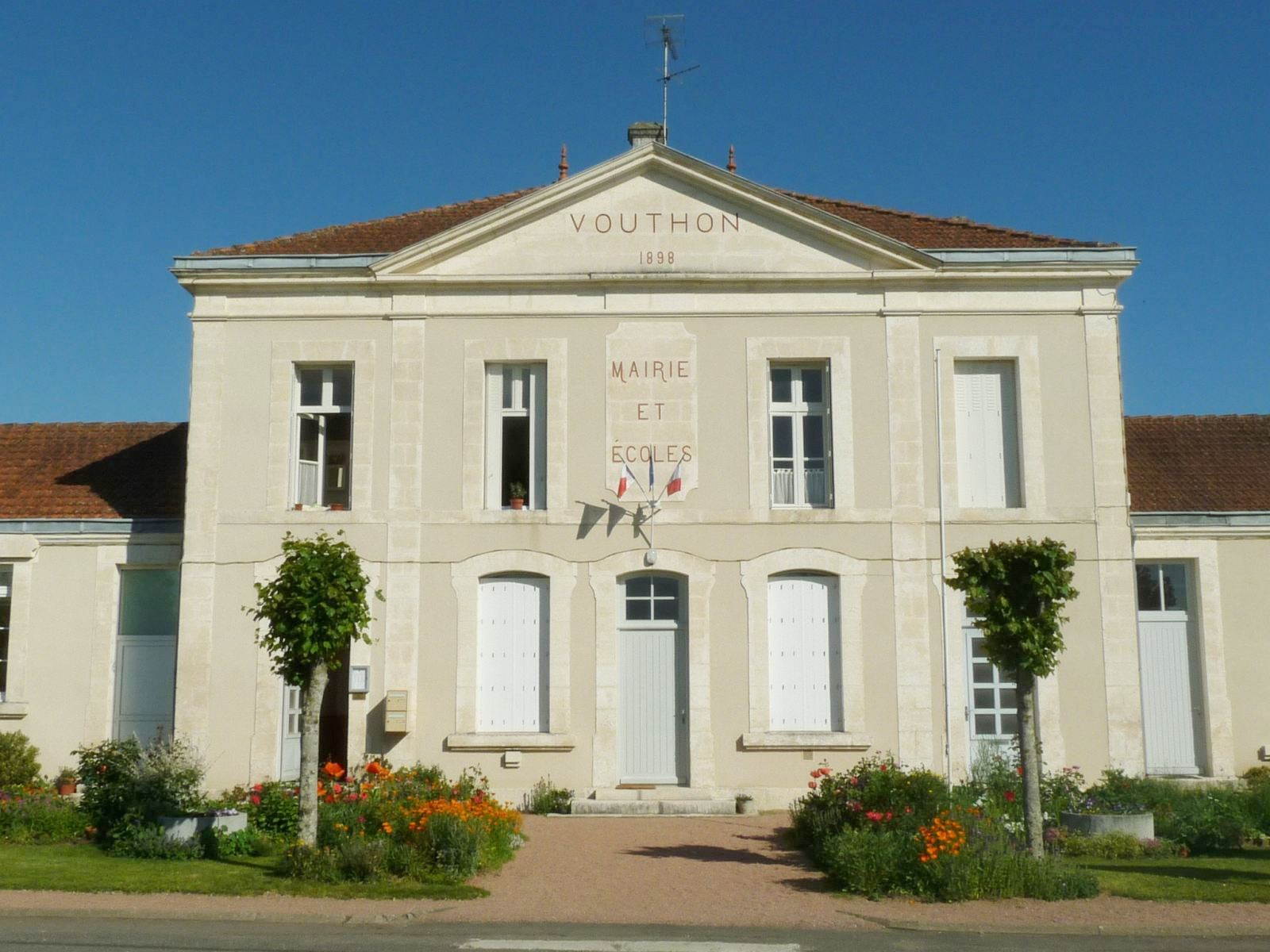 mairie de Vouthon, Charente, France